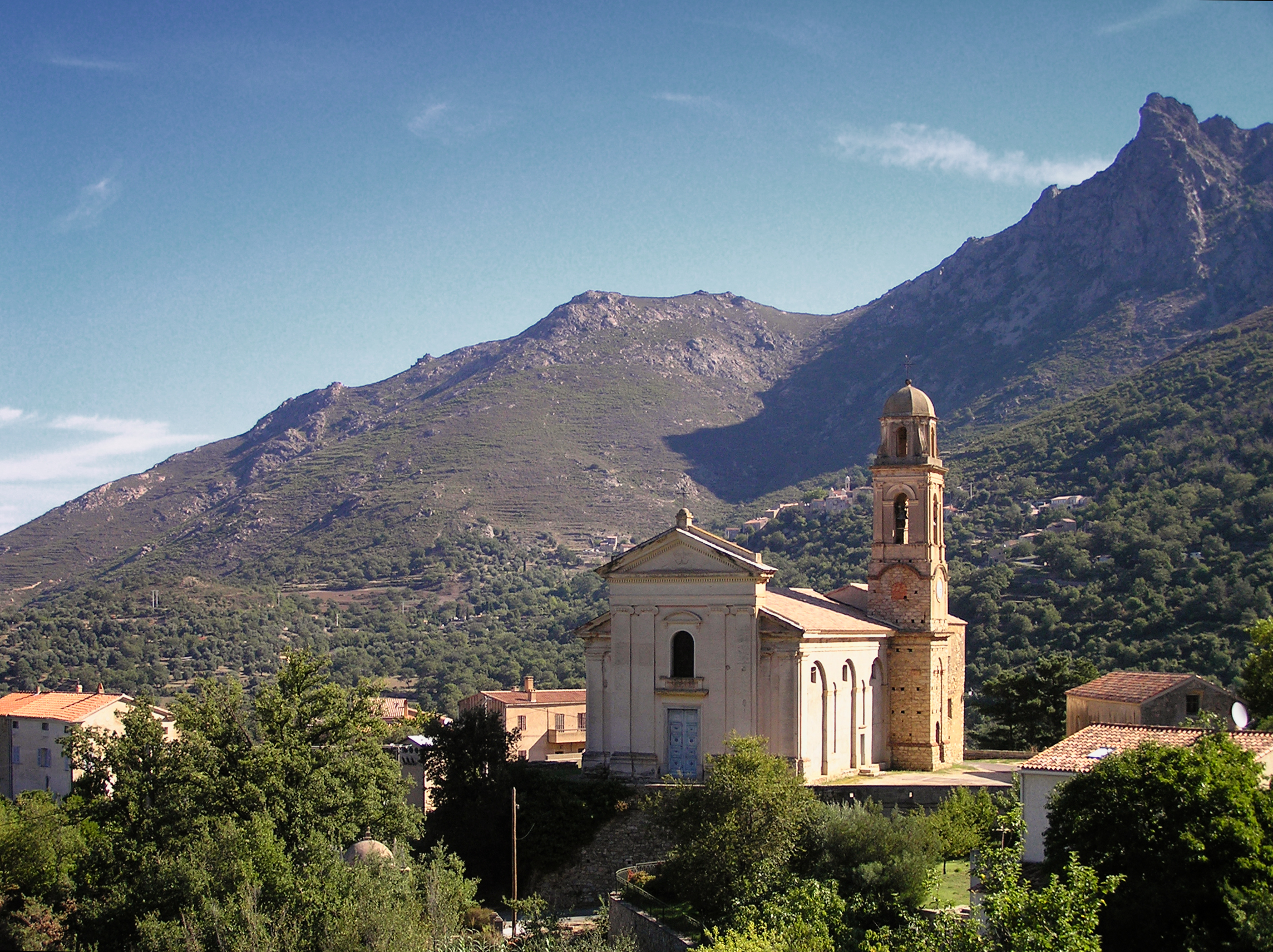 Feliceto, Balagne (Corse) - Église San Niculau (Saint-Nicolas)